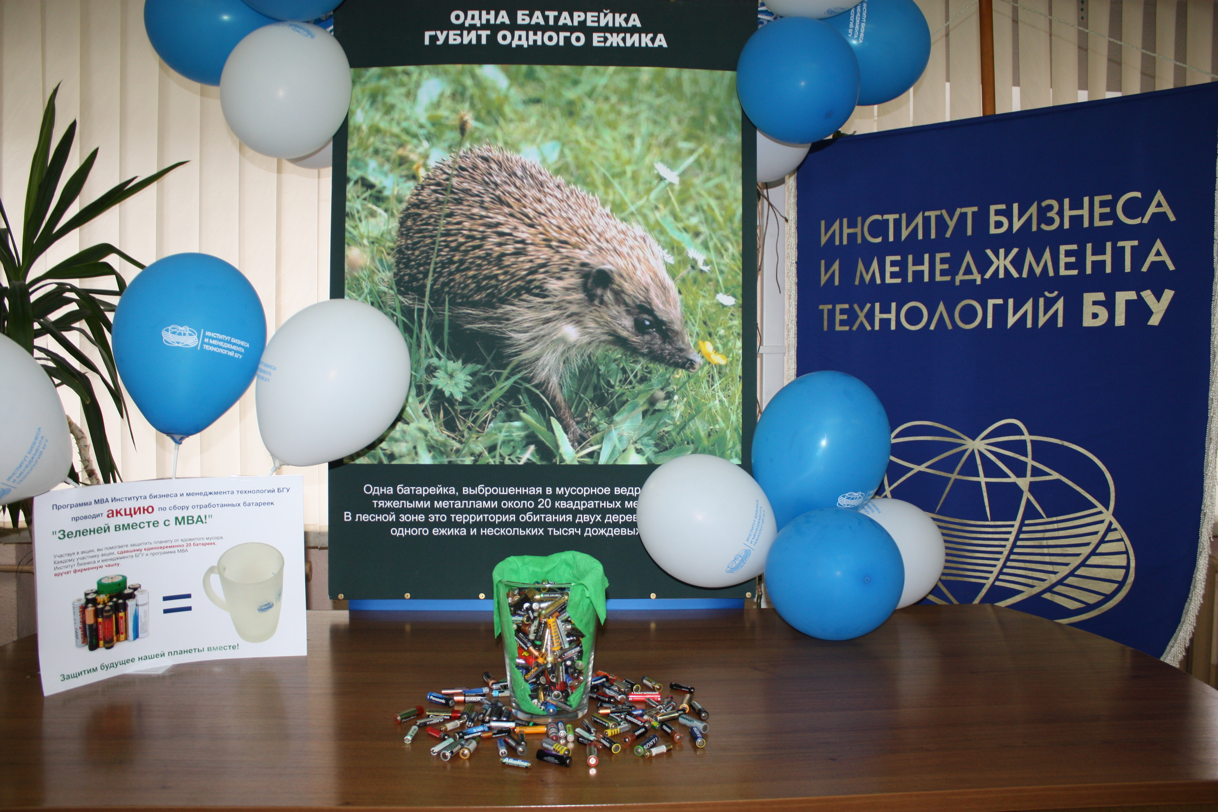 Акция "Зеленей вместе с МВА" по сбору отработанных батареек для дальнейшей утилизации